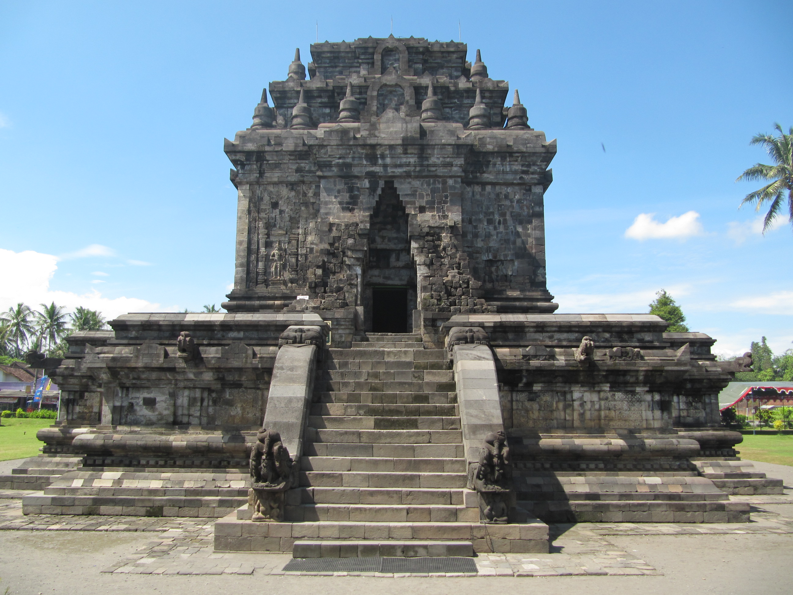 Candi Mendut